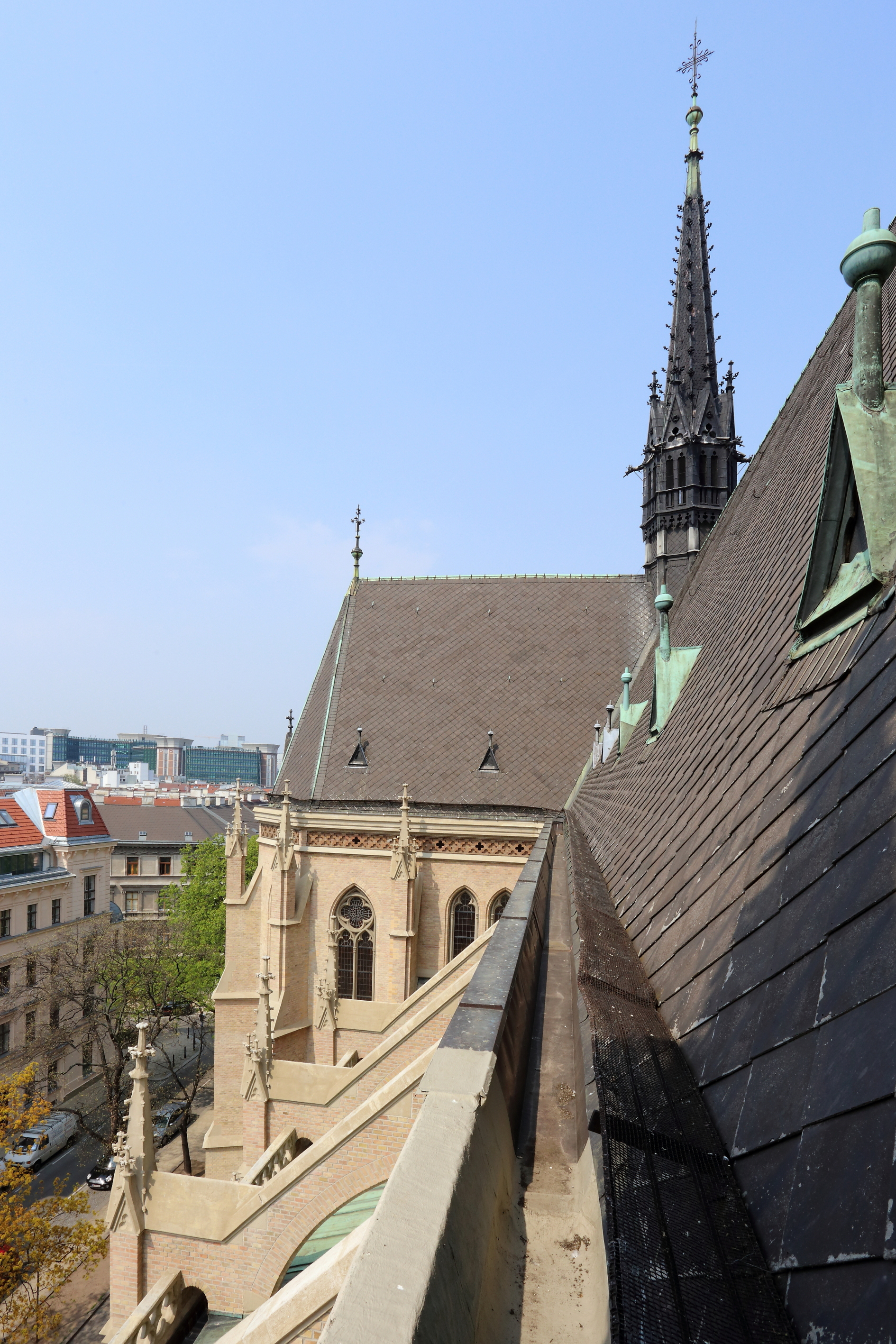 Blick vom Turm der Othmarkirche im 3. Wiener Gemeindebezirk Landstraße über das Dach des linken Seitenschiffes.